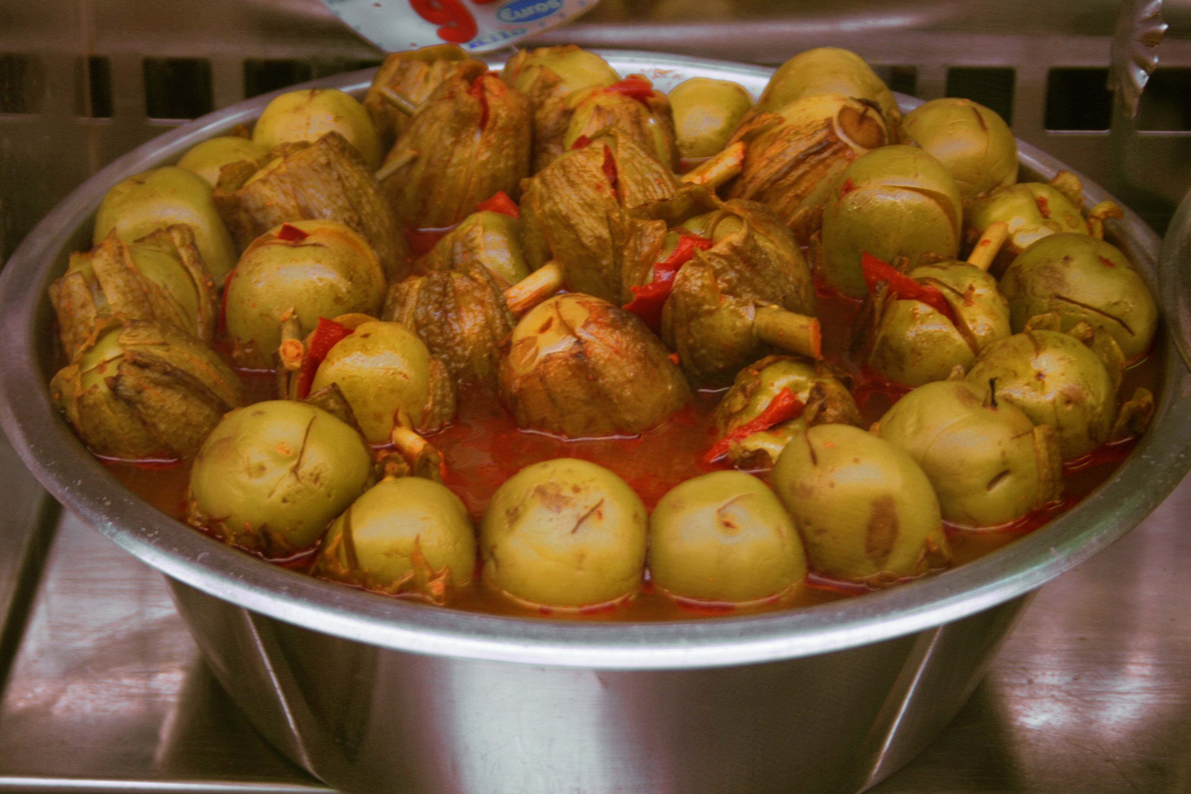 Berenjenas encurtidas de Almagro